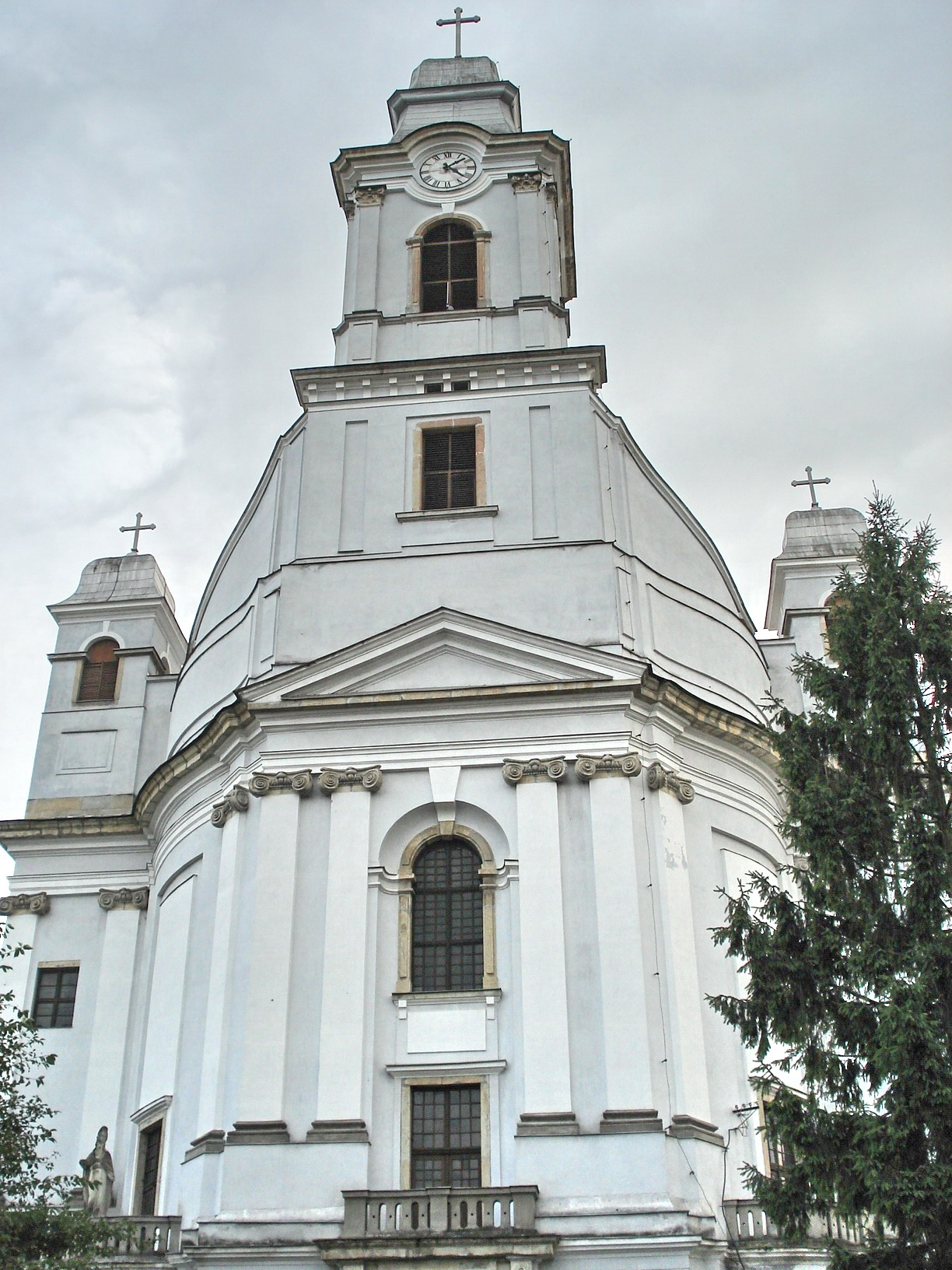 Stalin